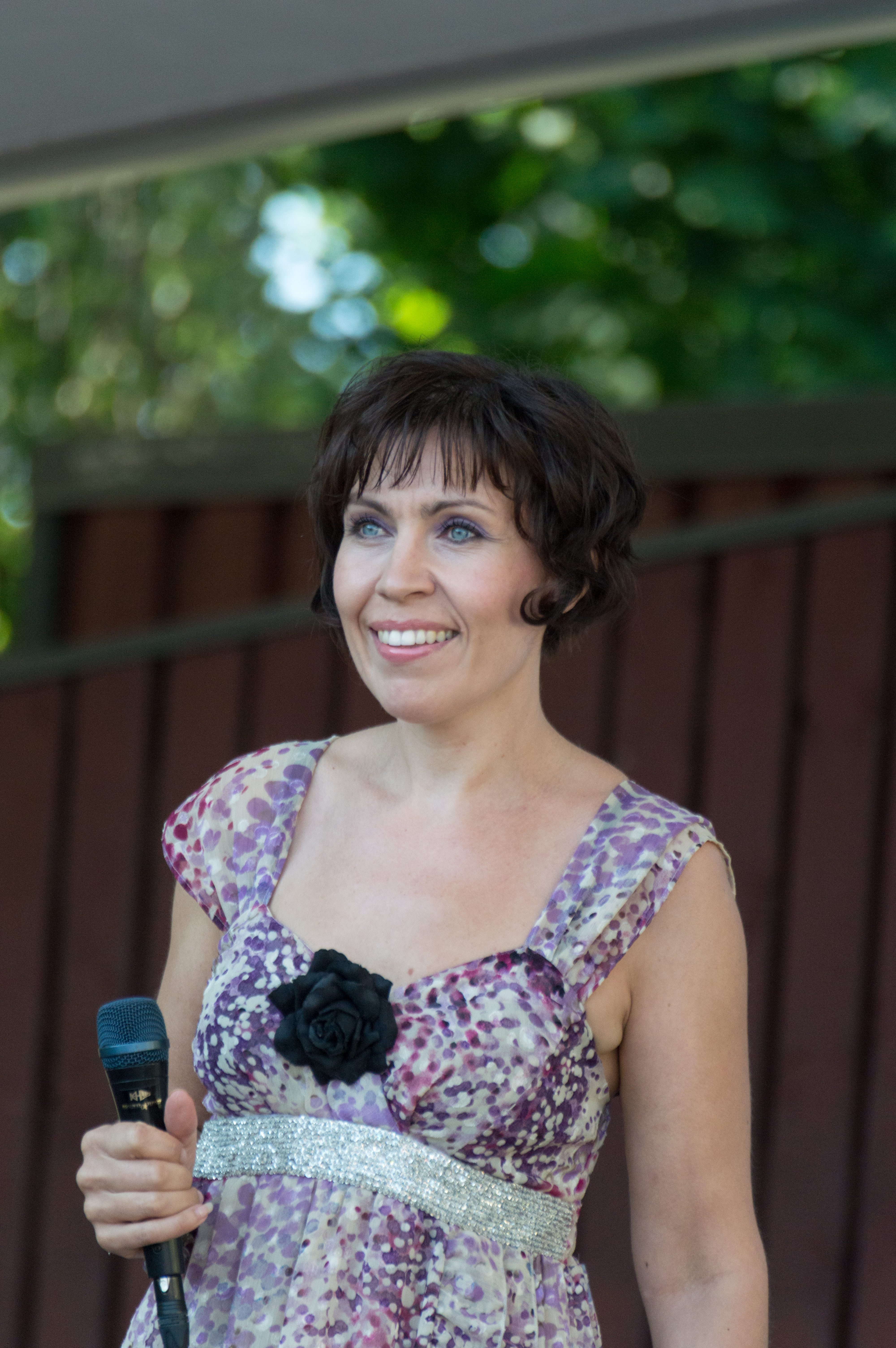 Anna Hanski suomalainen laulaja